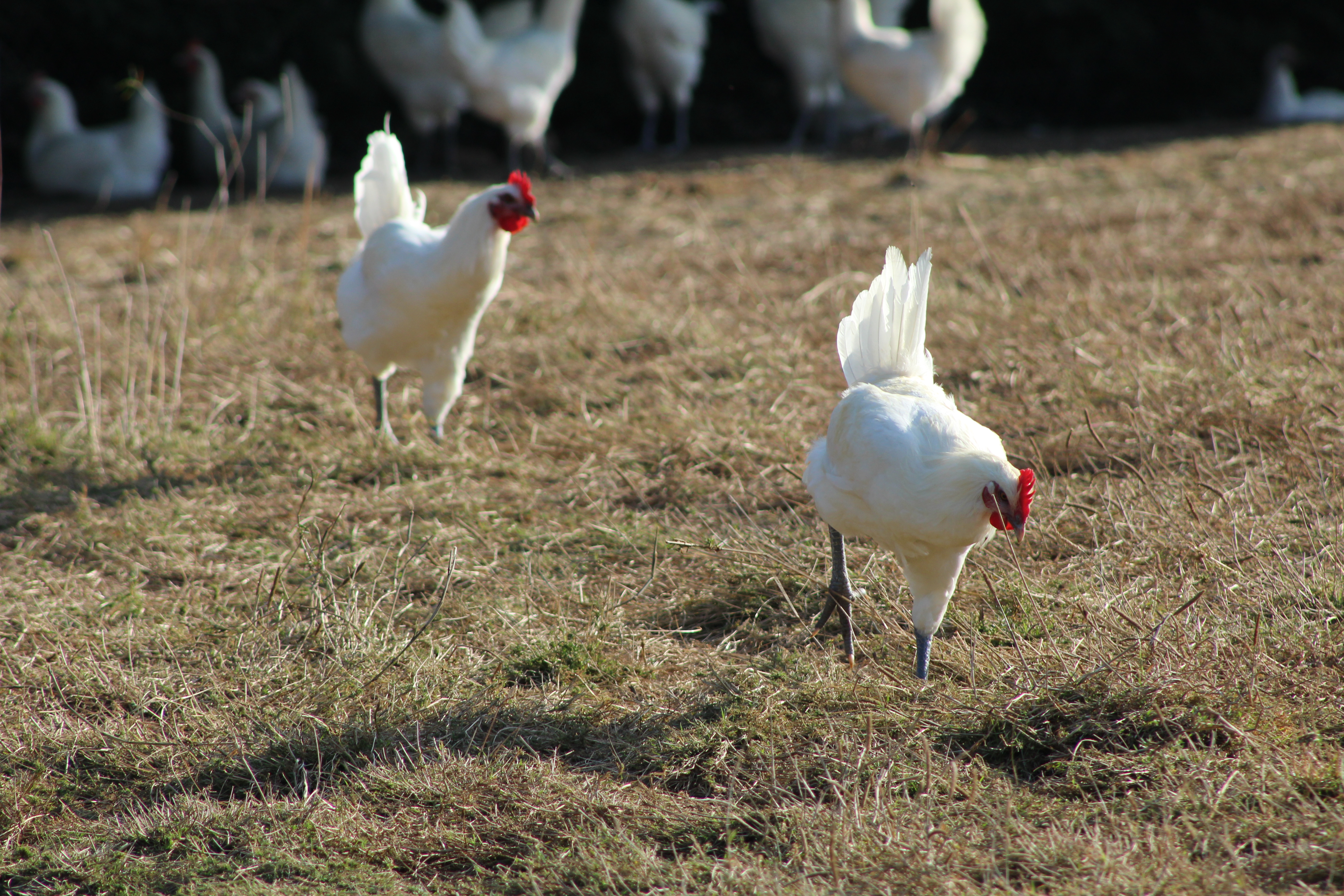 Poulets de Bresse au hameau du Pin à Saint-Genis-sur-Menthon.